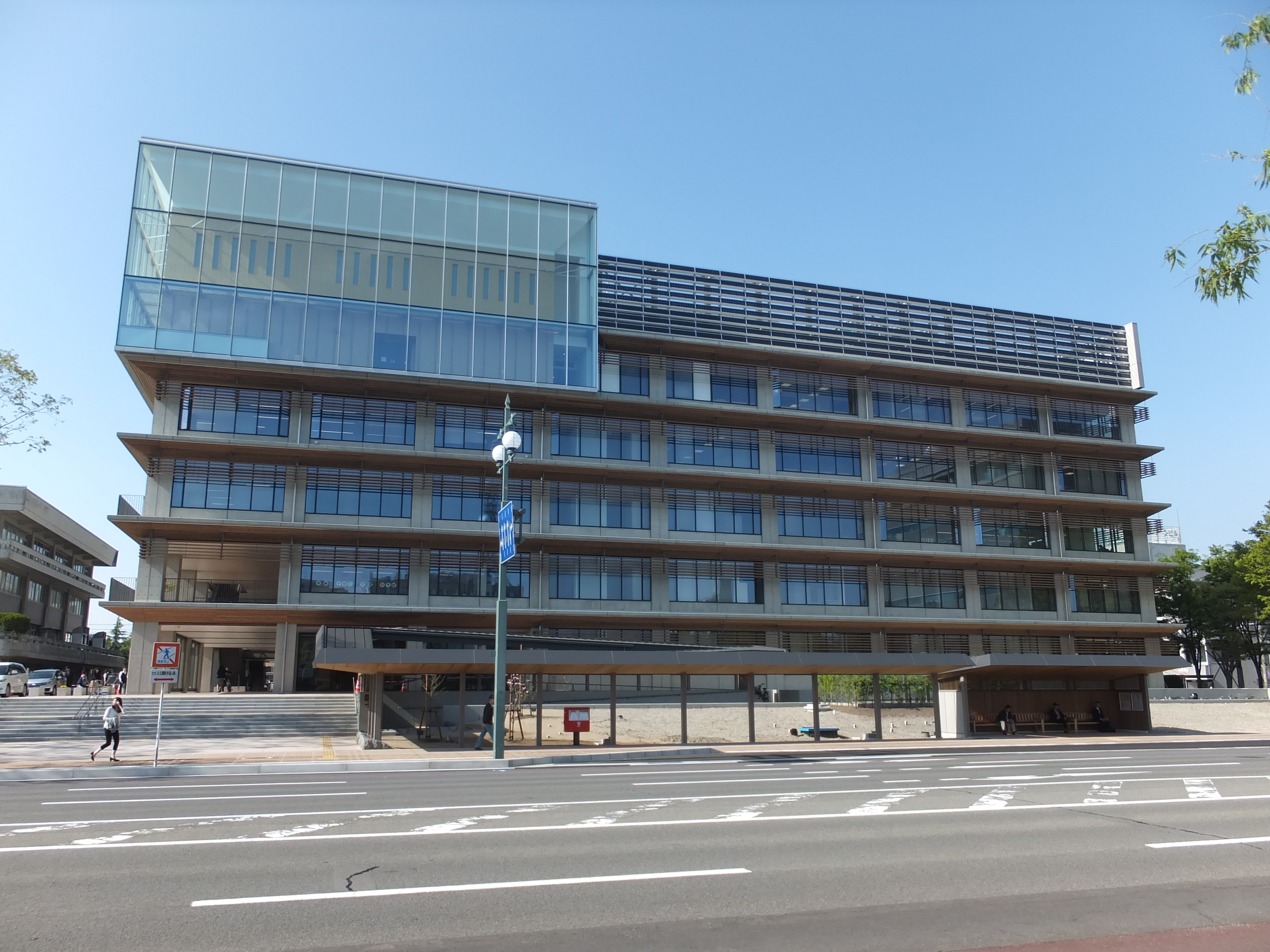 2016年4月26日に竣工した秋田市役所新庁舎。同5月6日より業務を開始した。山王大通りを挟んで秋田県庁側より撮影